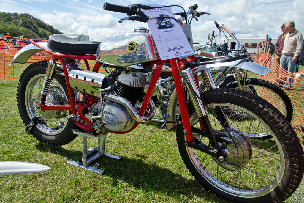 DOT Trials 1964 Llandudno Transport Festival 04/05/2013